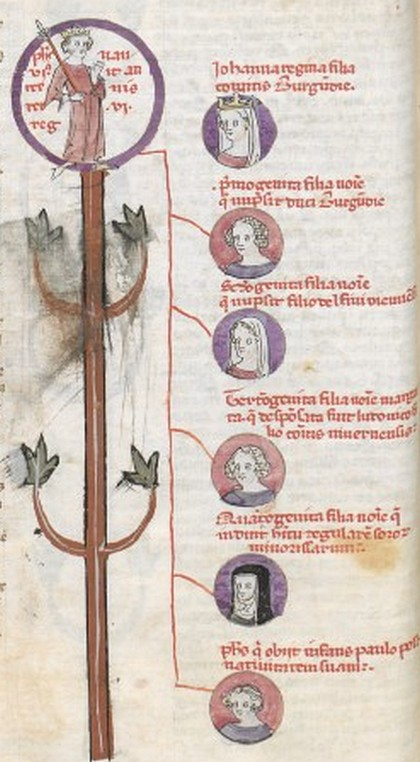 Arbre généalogique